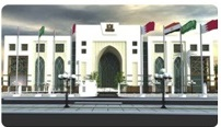 الجامعة العربية المفتوحه بالبحرين